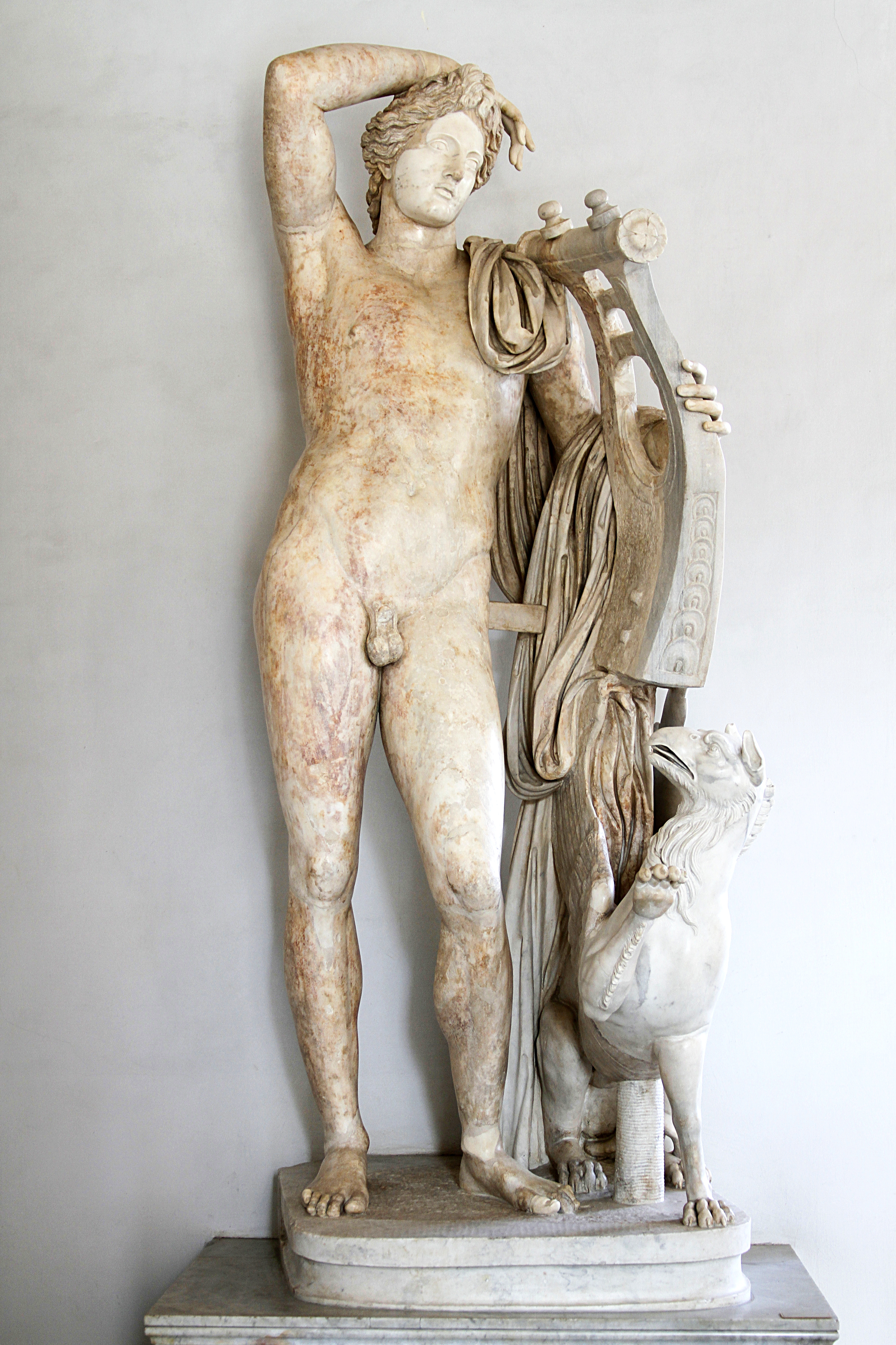 Palazzo Nuovo - Musei Capitolini - Rome